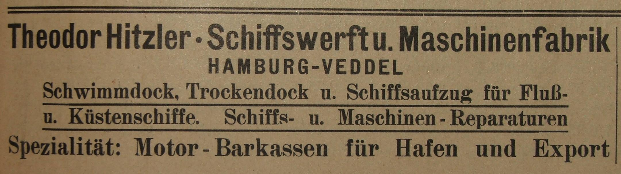 Werbung der Hitzler Werft in der Fachzeitschrift Hansa von 1913